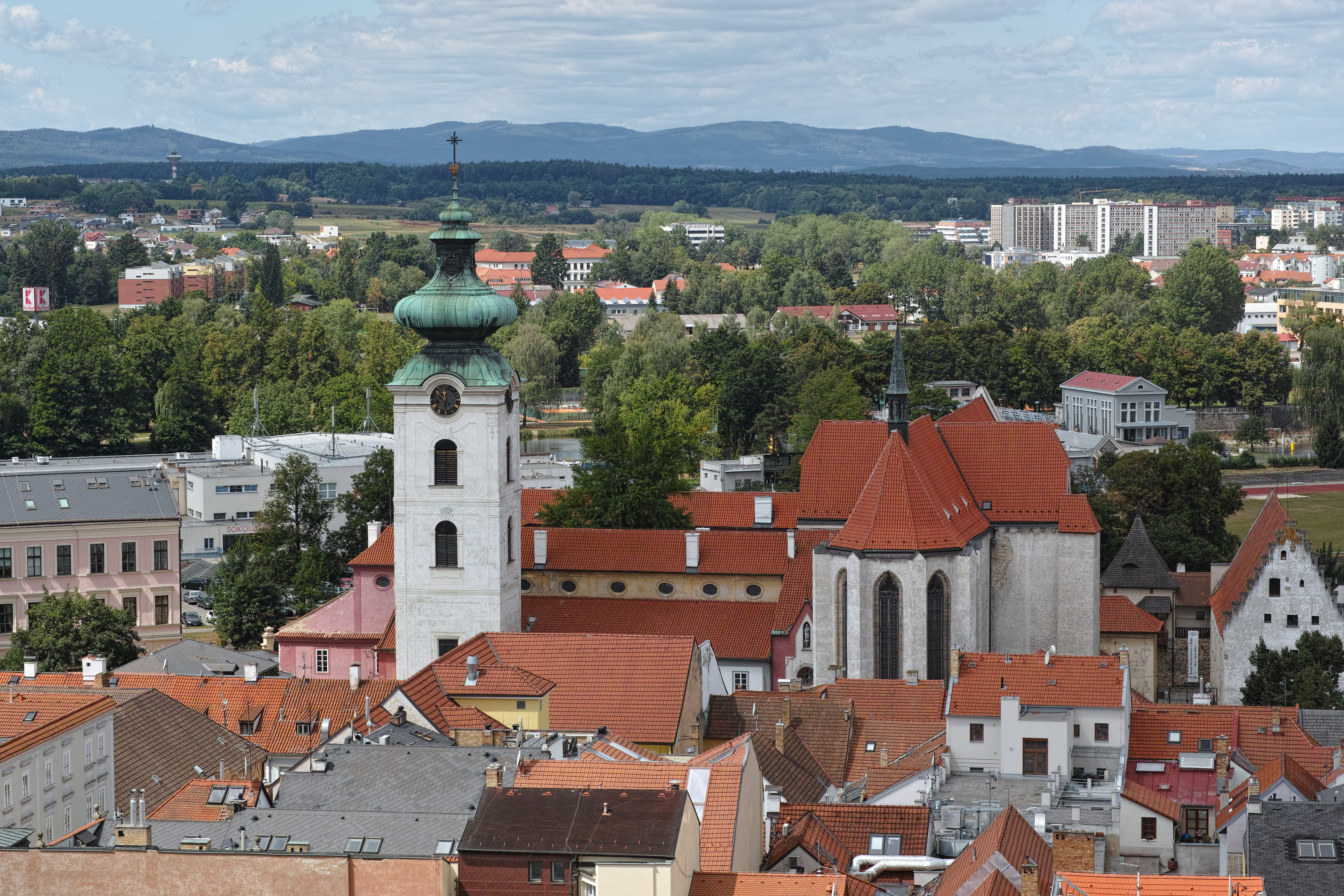 Bílá věž a kostel Obětování Panny Marie z Černé věže